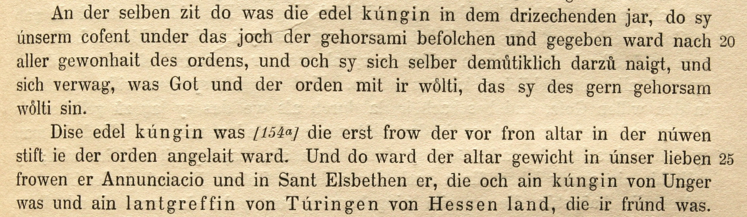 Kloster Töss; Aus dem Schwesternbuch von Elsbet Stagel: erste Erwähnung von Elisabeth von Ungarn